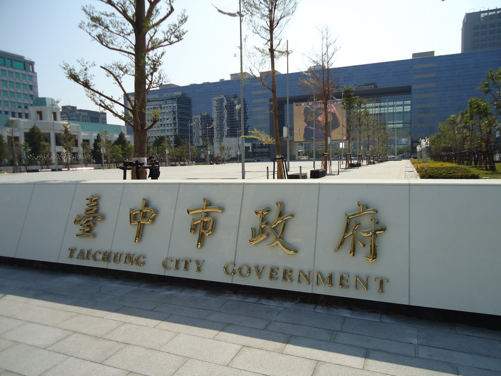 中文（台灣）: 台中市政府 白天